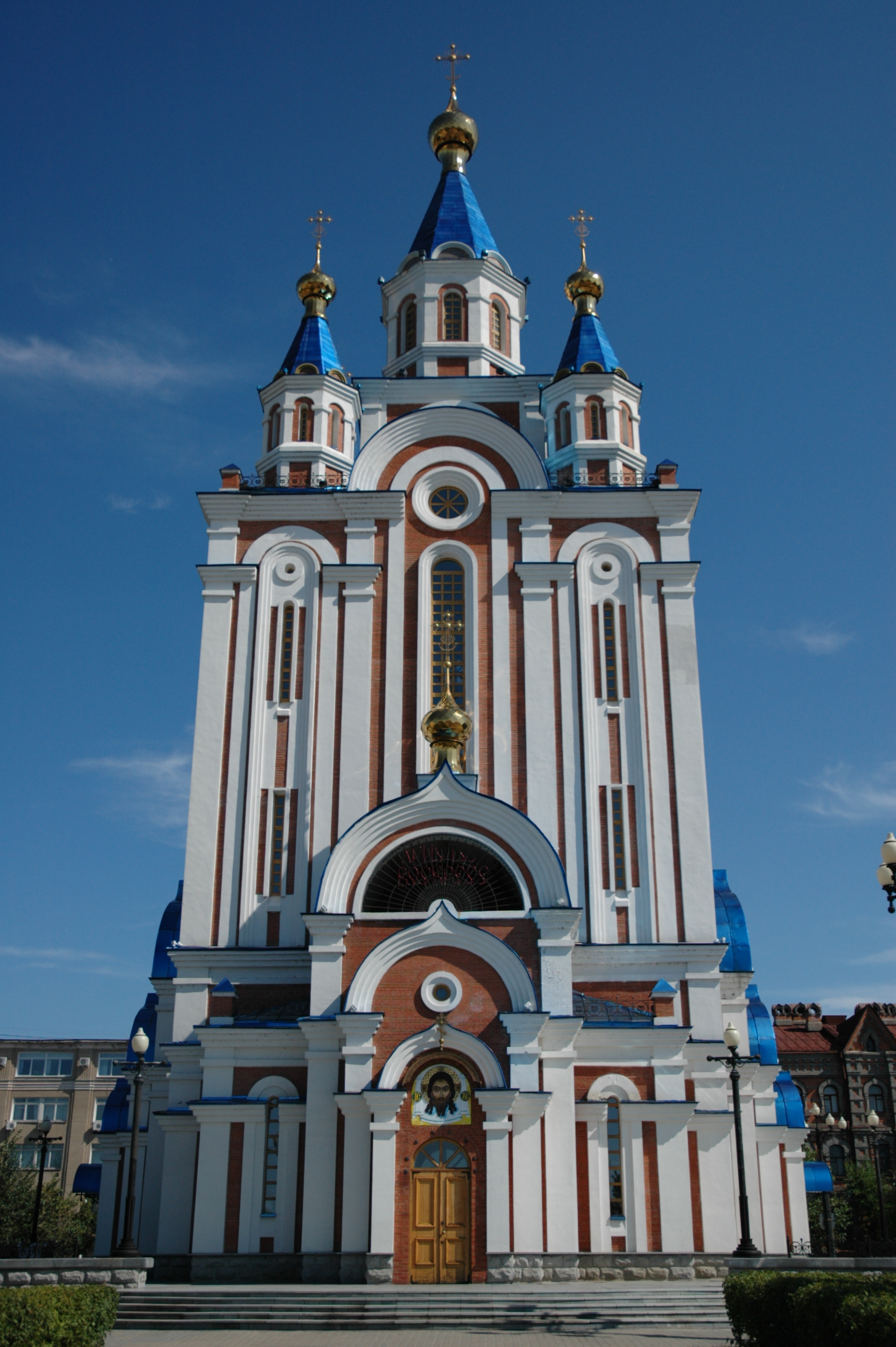 Church in Khabarovsk